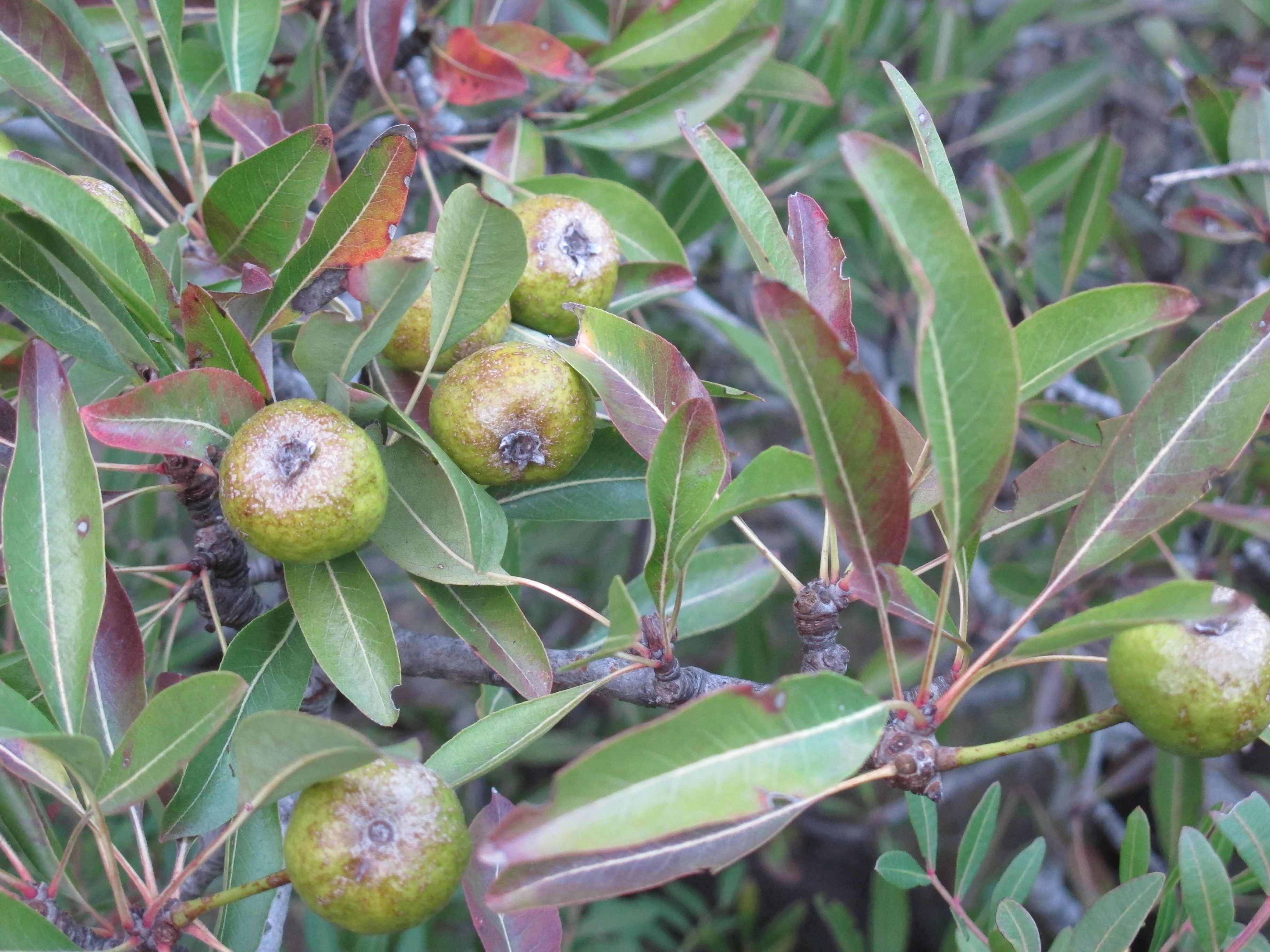 Pyrus spinosa (fruits)